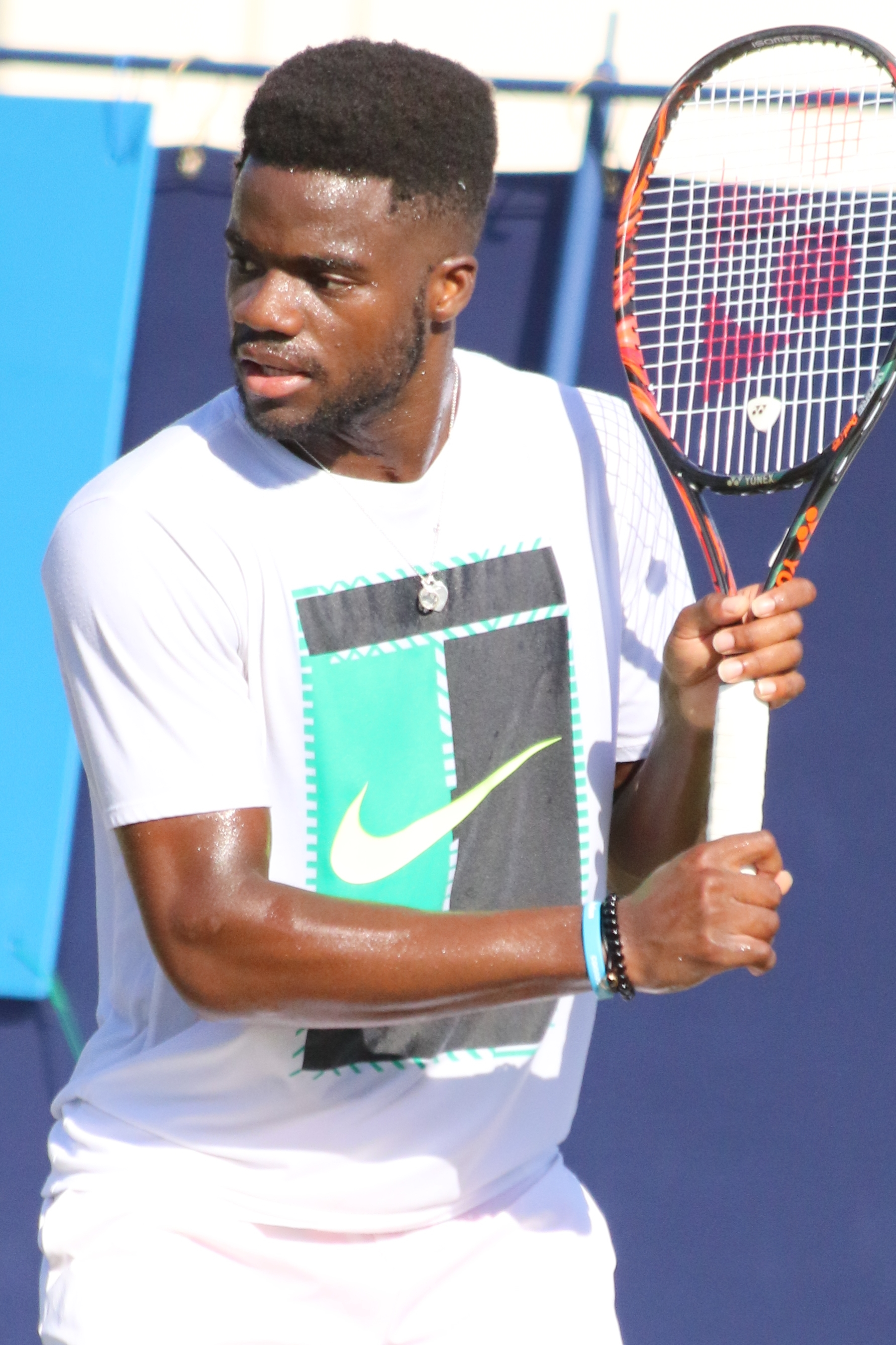 Tiafoe EBN17 (3)